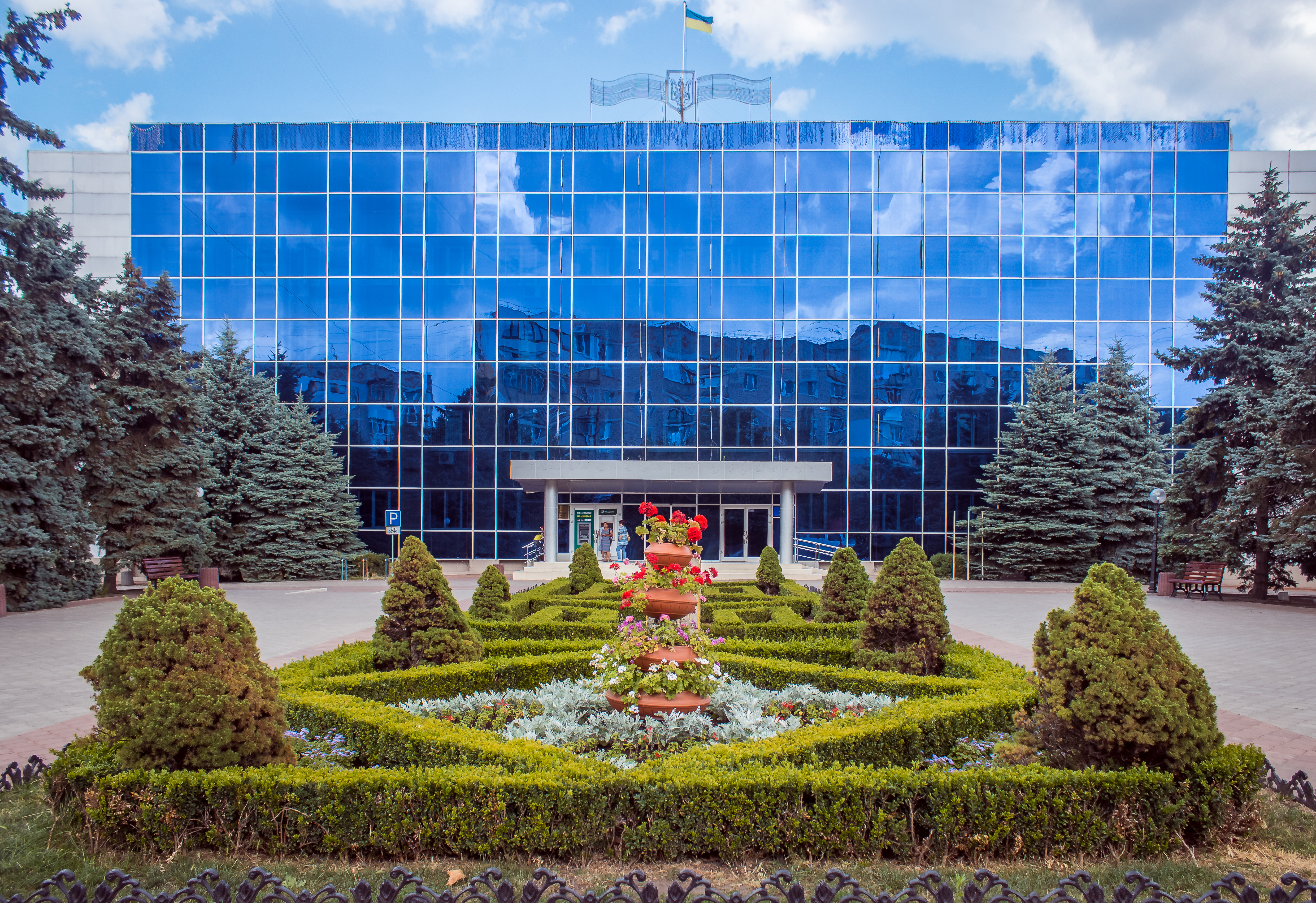 Здание исполнительного комитета Черноморского городского совета.